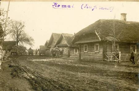 Беларуская (тарашкевіца): Камаі (Kamaji). Вуліца